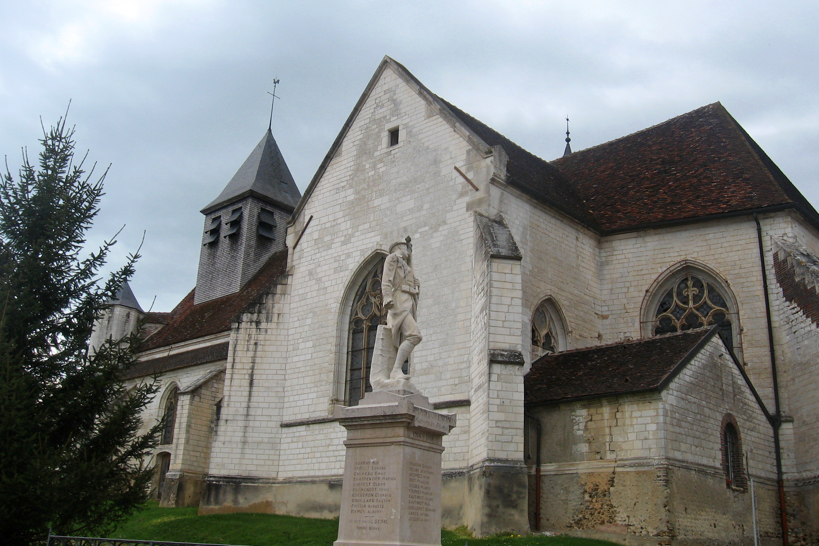 Sormery (Yonne)